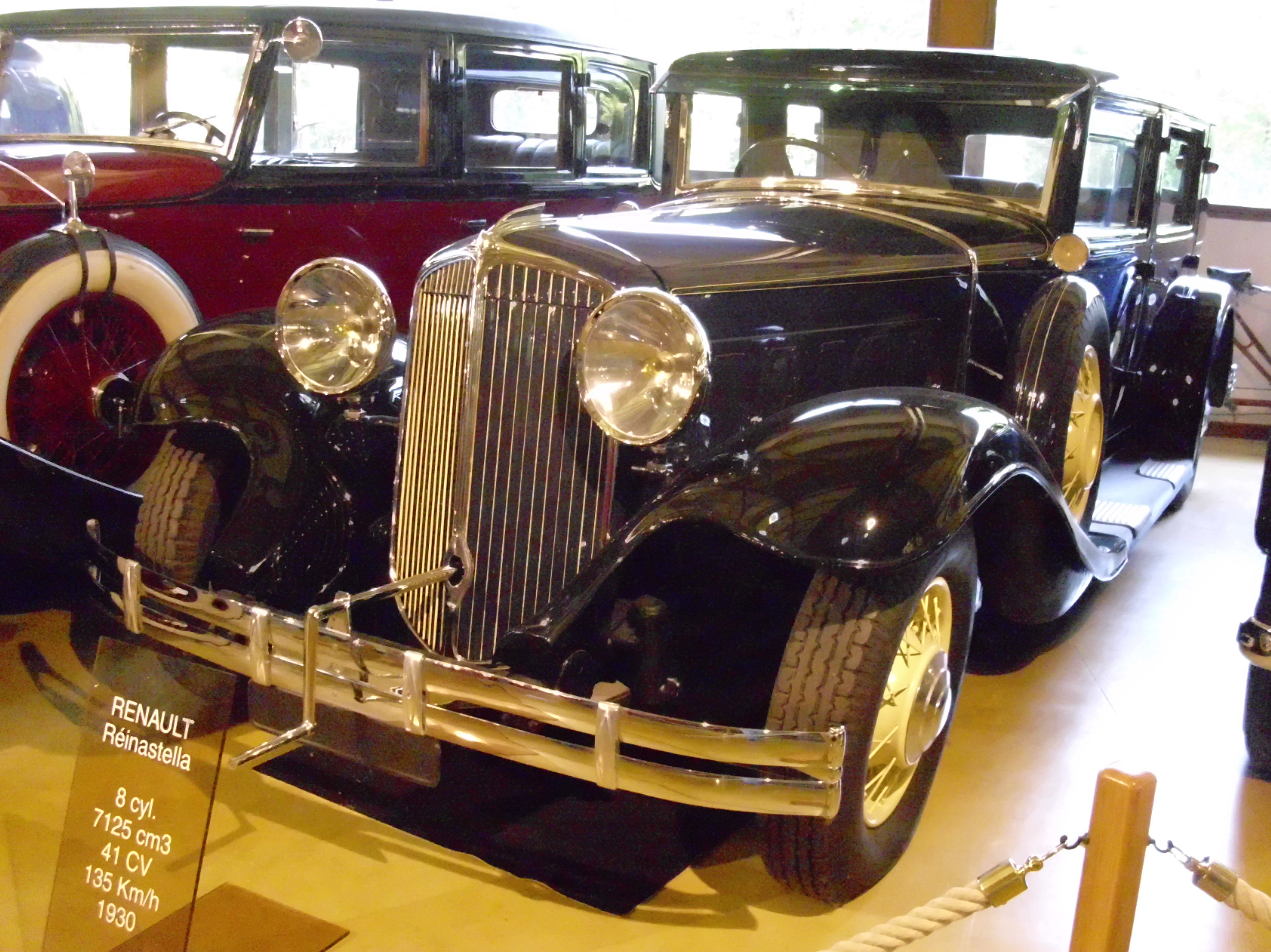 Renault Reinastella Limousine 1931-1932